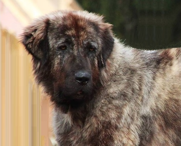 Stromung beim Karakachan